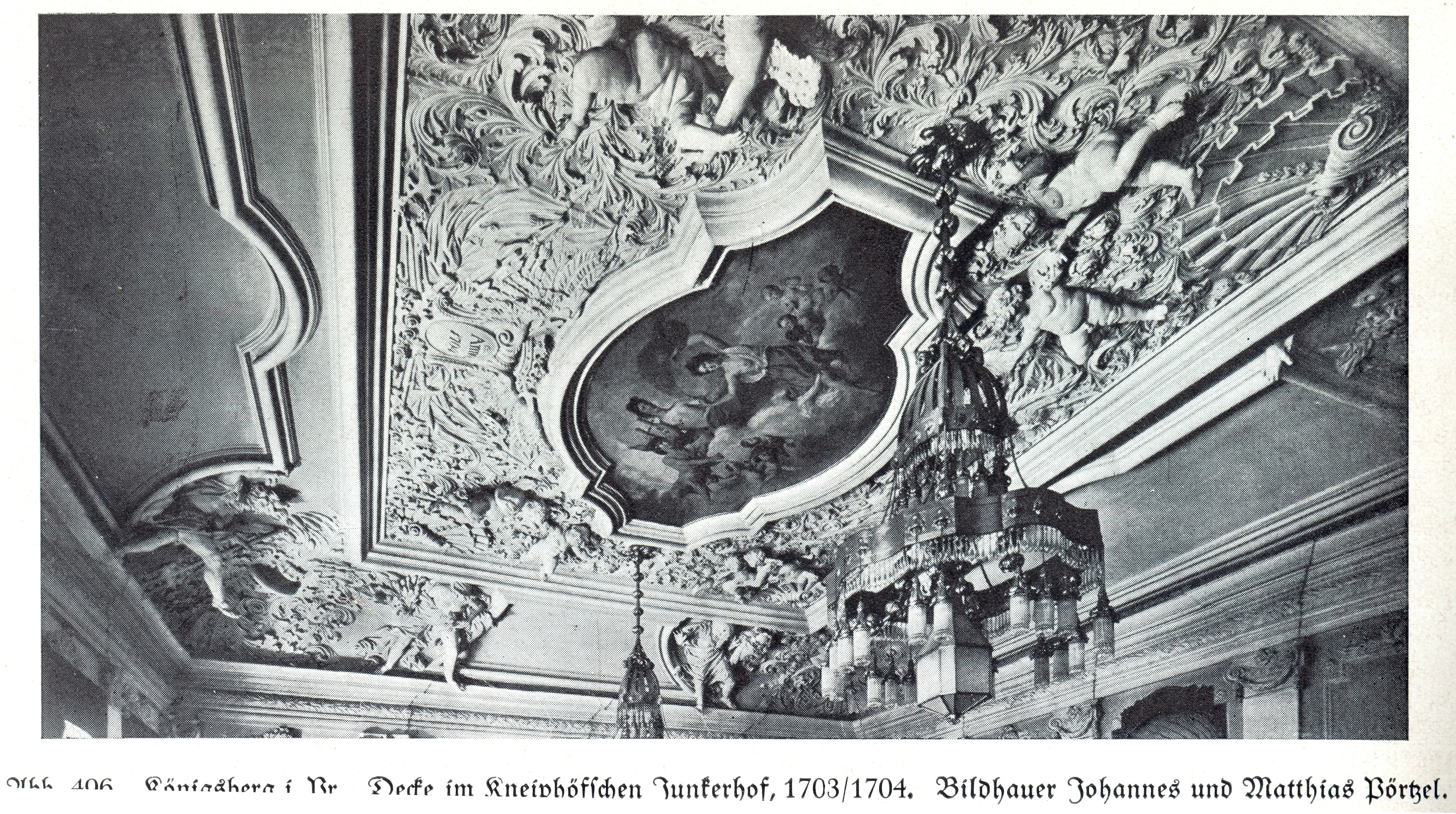 Königsberg, Artushof im Stadtteil Kneiphof (Kneiphöfscher Junkerhof), Stuckdecke, 1704, Bildhauer Johannes und Matthias Pörtzel